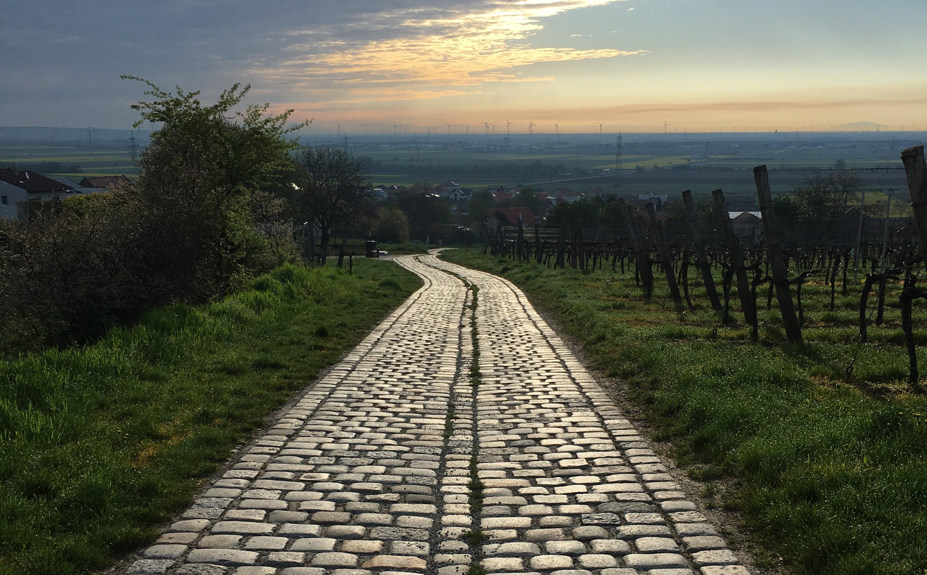 Hagenbrunn, Blick über Aichleitenweg Richtung Gerasdorf